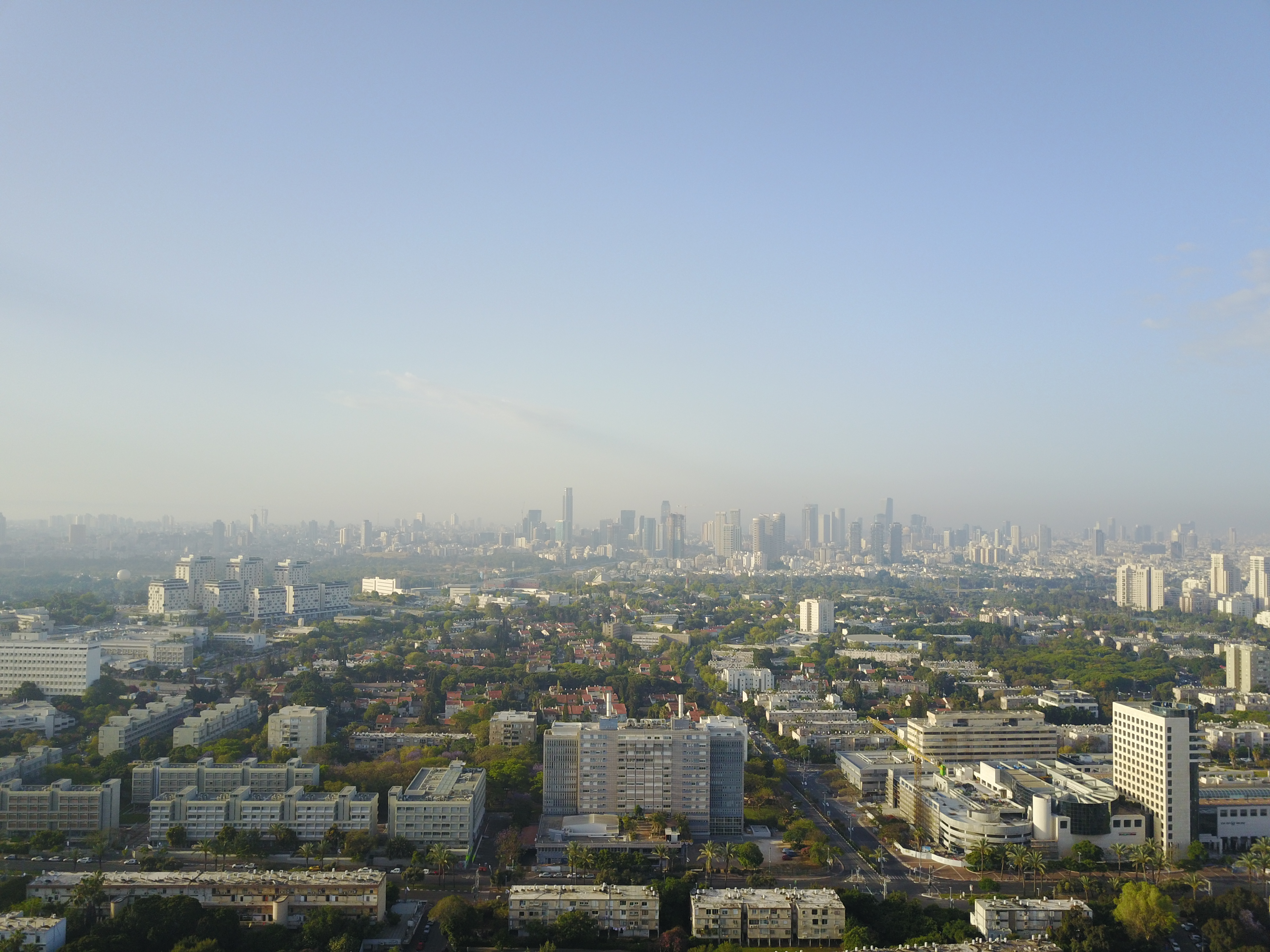 רמת אביב א' (רמת אביב הריקוה) בתצלום אוויר